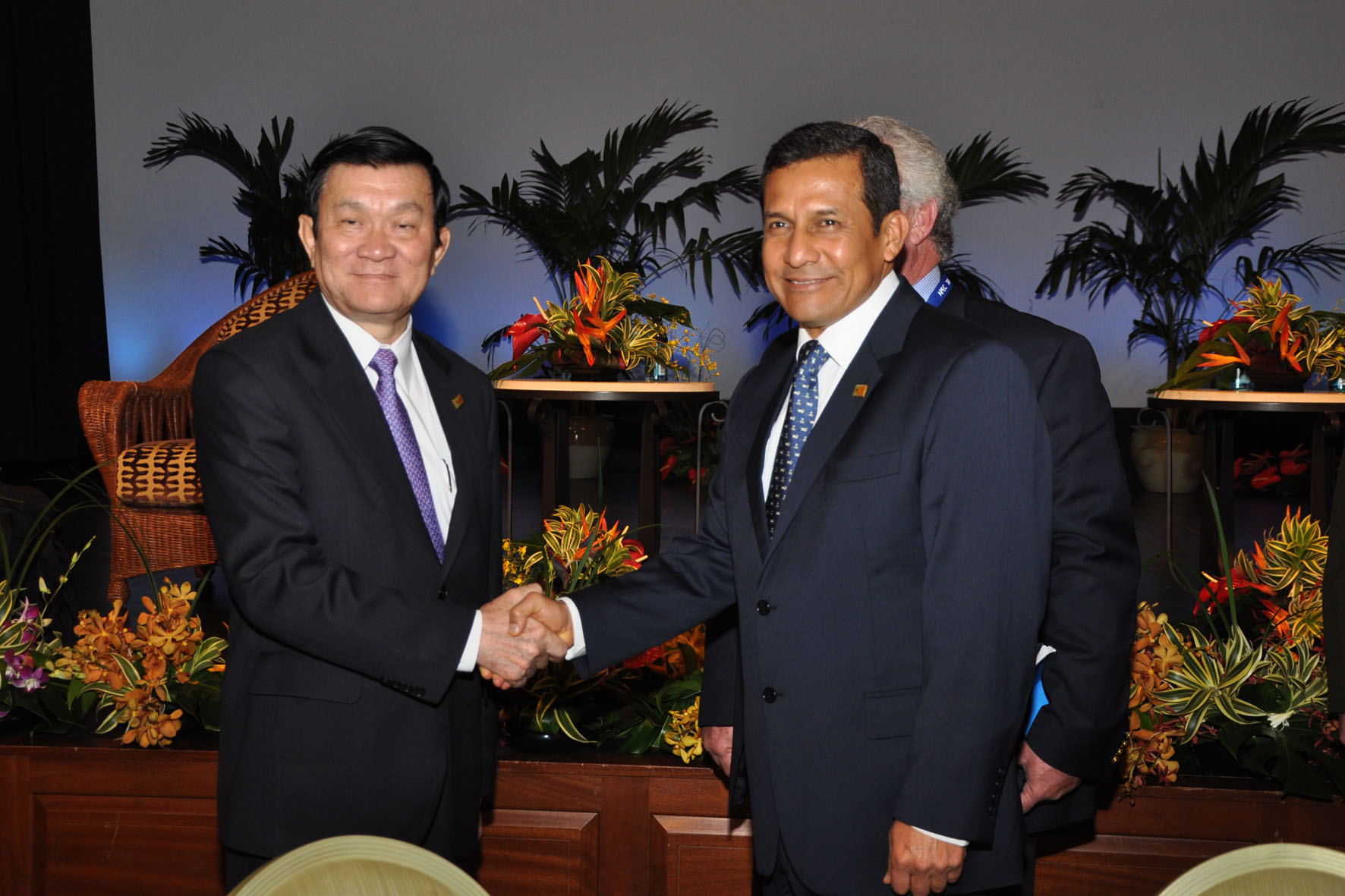 Perú y Vietnam fueron presentadas hoy en Hawai como ecomomías emergentes de APEC. Asimismo, los presidentes de Perú Ollanta Humala y su homólogo de Vietnam, Truong Tan Sang fueron reconocidos como nuevos Líderes de las economías del Asia Pacífico.